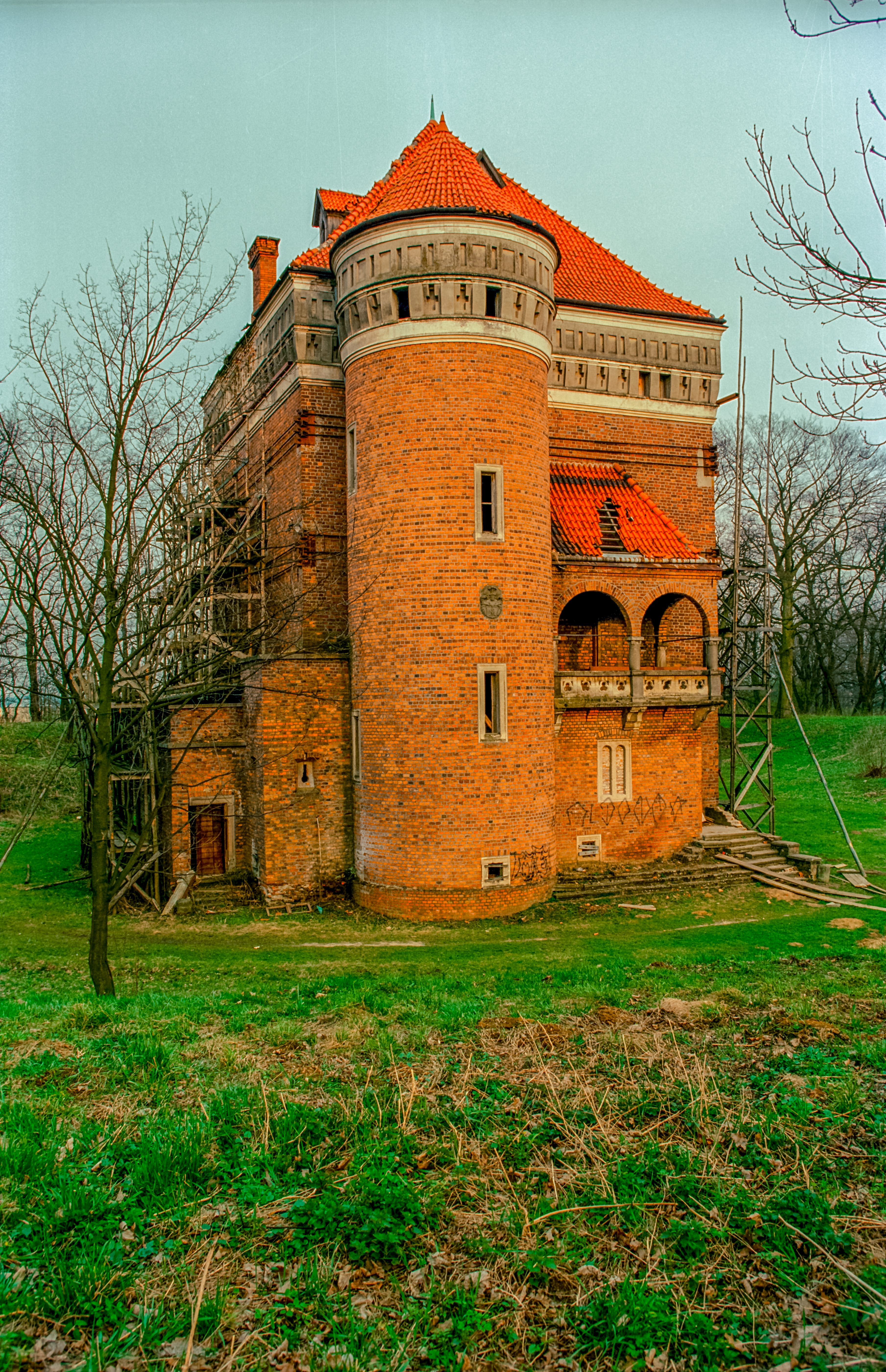 Rzemień, ruiny zamku